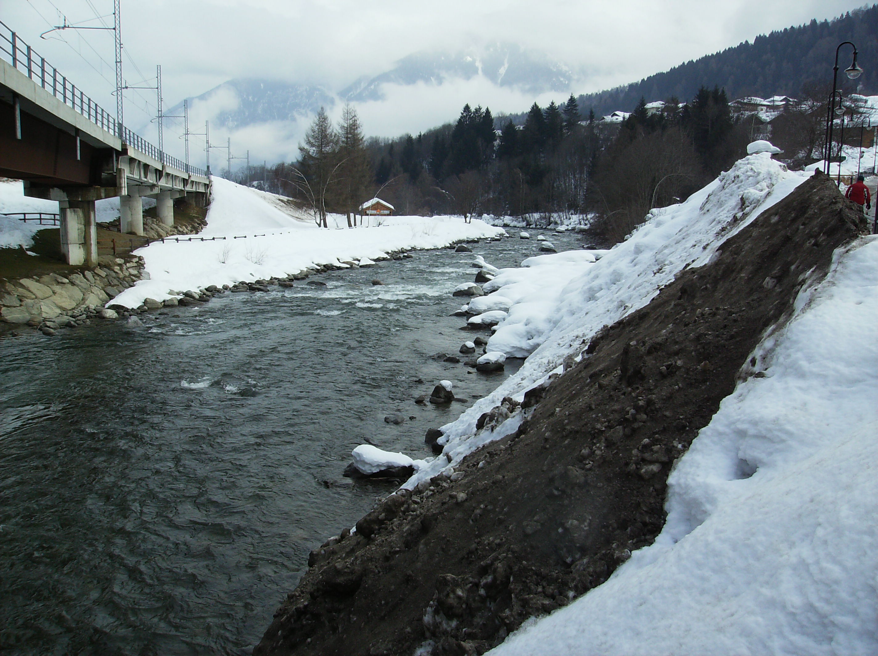 rivière Noce - Commezzadura- prov. Trento - Italie